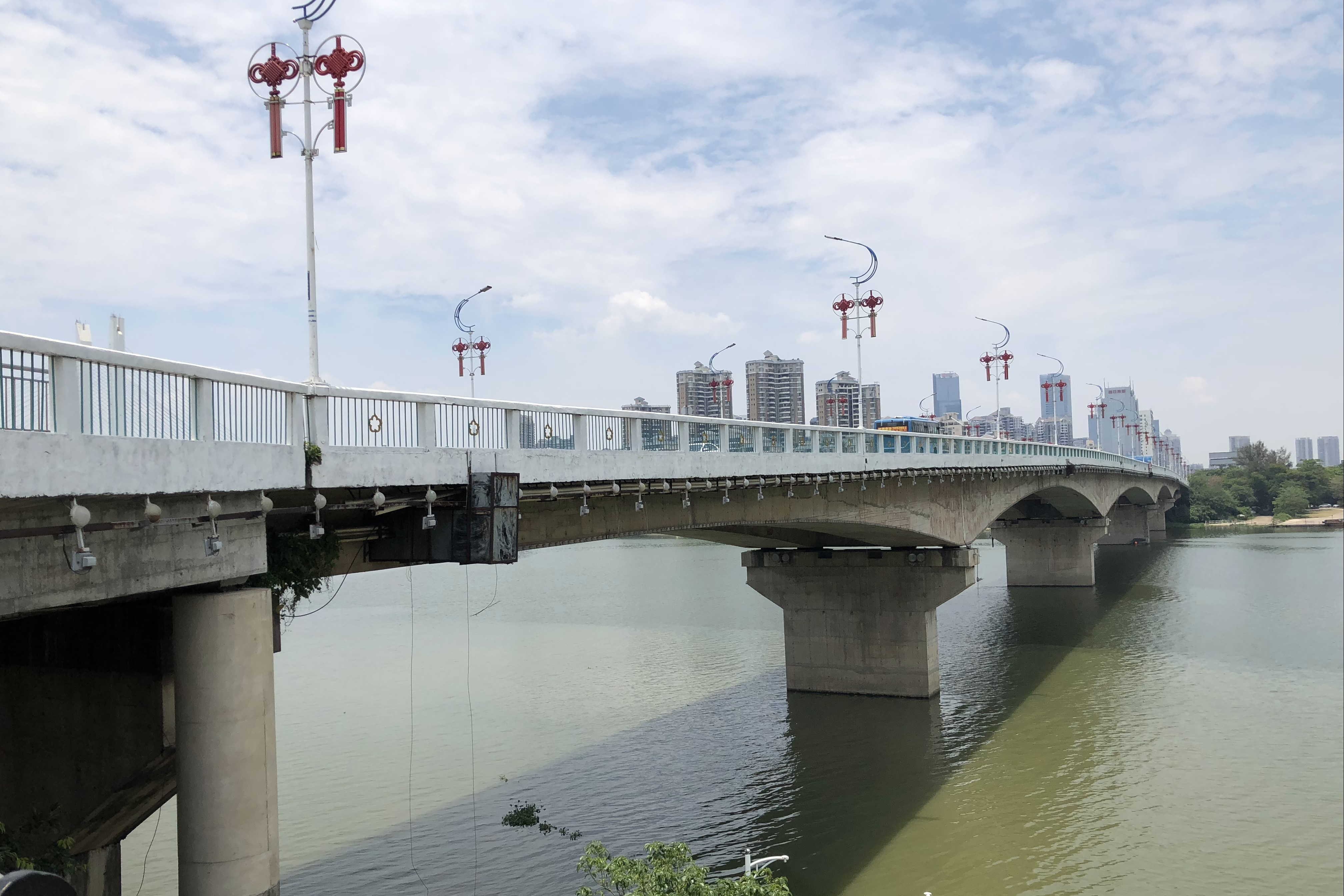 中文（中国大陆）: 惠州大桥。